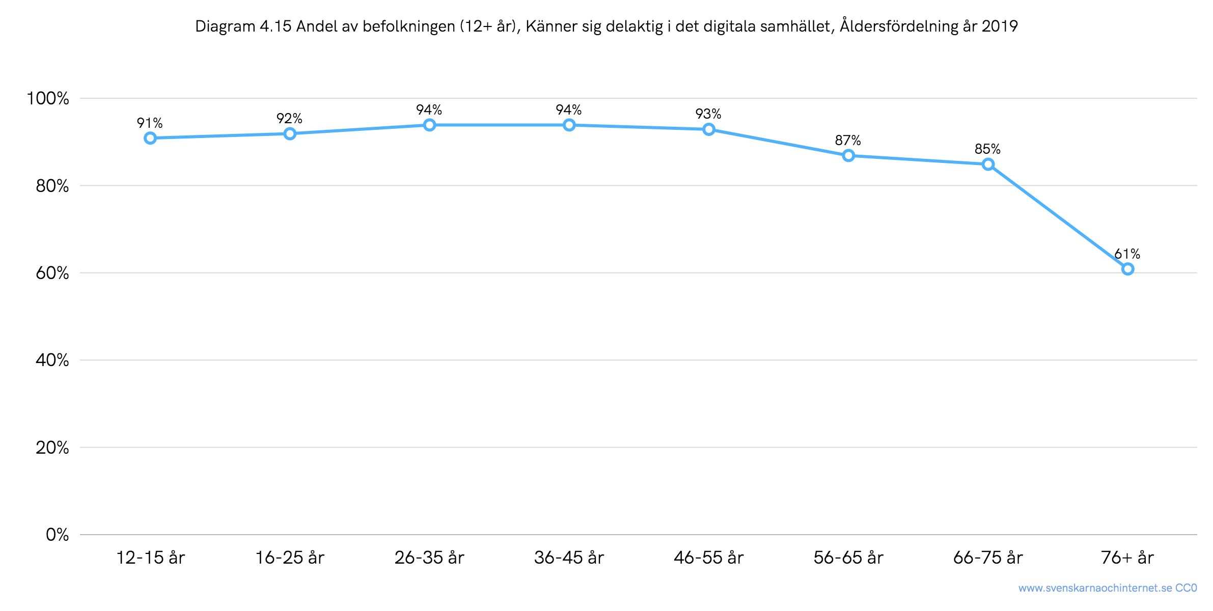 Andel av Sveriges befolkning (12+ år) som känner sig delaktig i det digitala samhället 2019, fördelat på ålder.